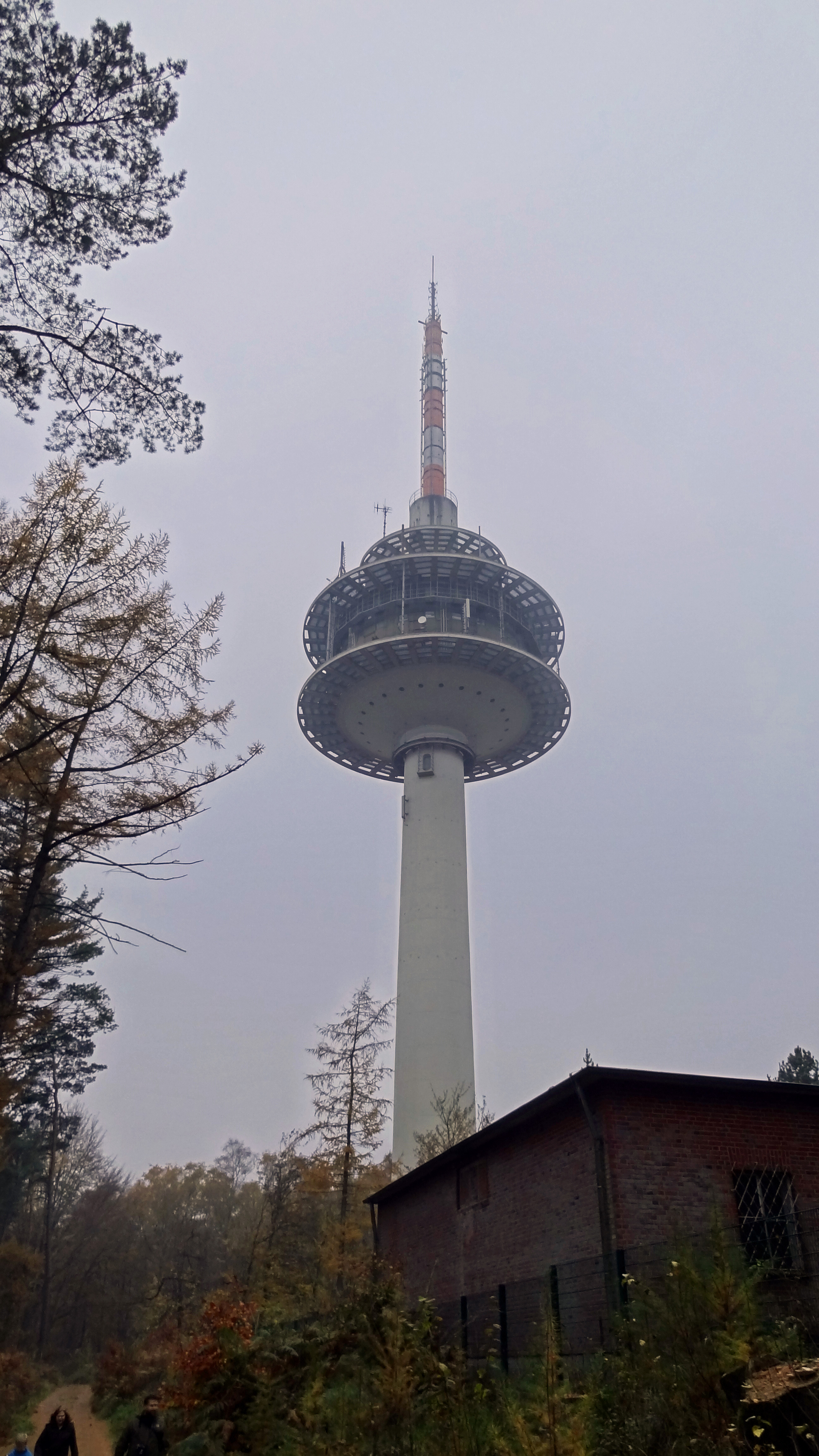 Der Fernsehturm auf der Hohen Mark, unweit von Haltern am See